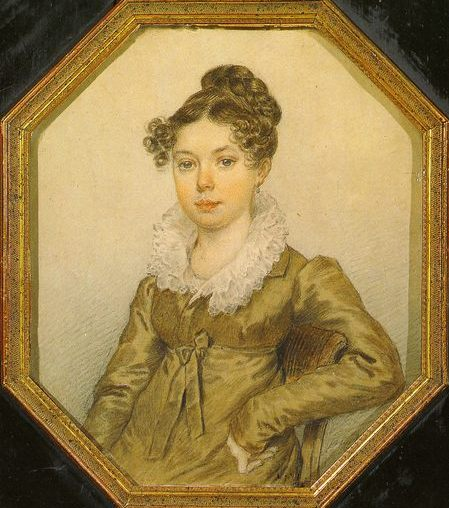 Ульяна (Юлиана) Христофоровна Иленьева, ур. графиня Миних (1791—1820).